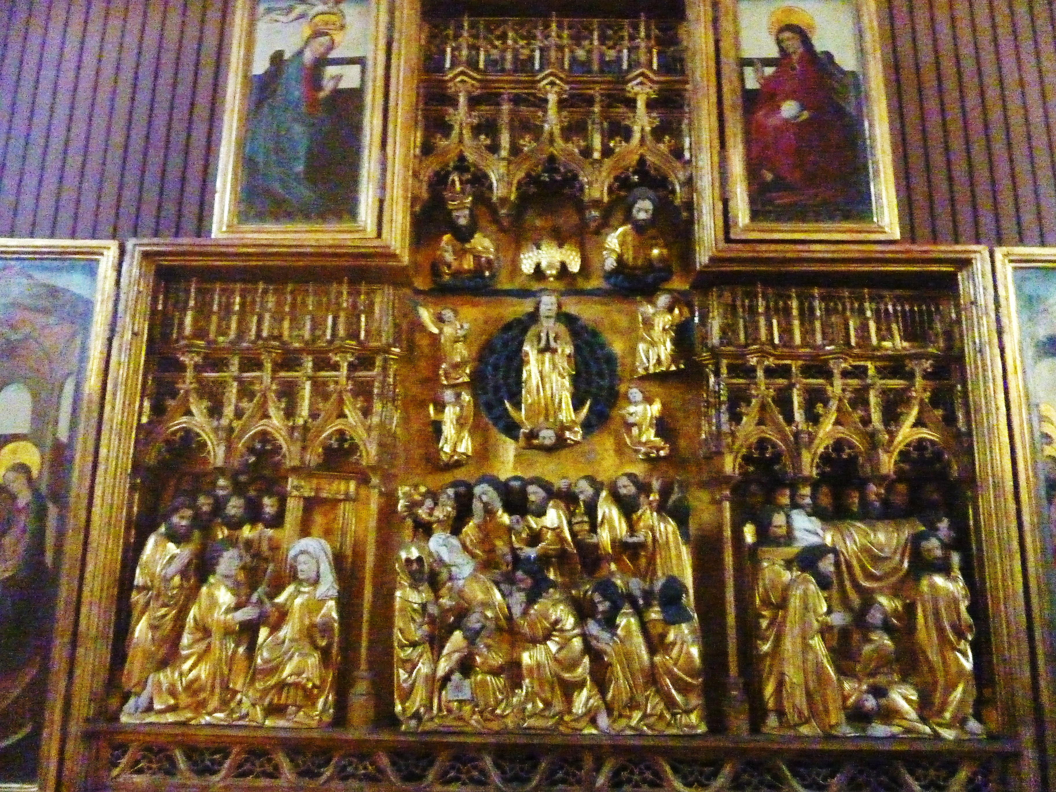 Ternant (Nièvre) : le retable de la Vierge, vue d'ensemble